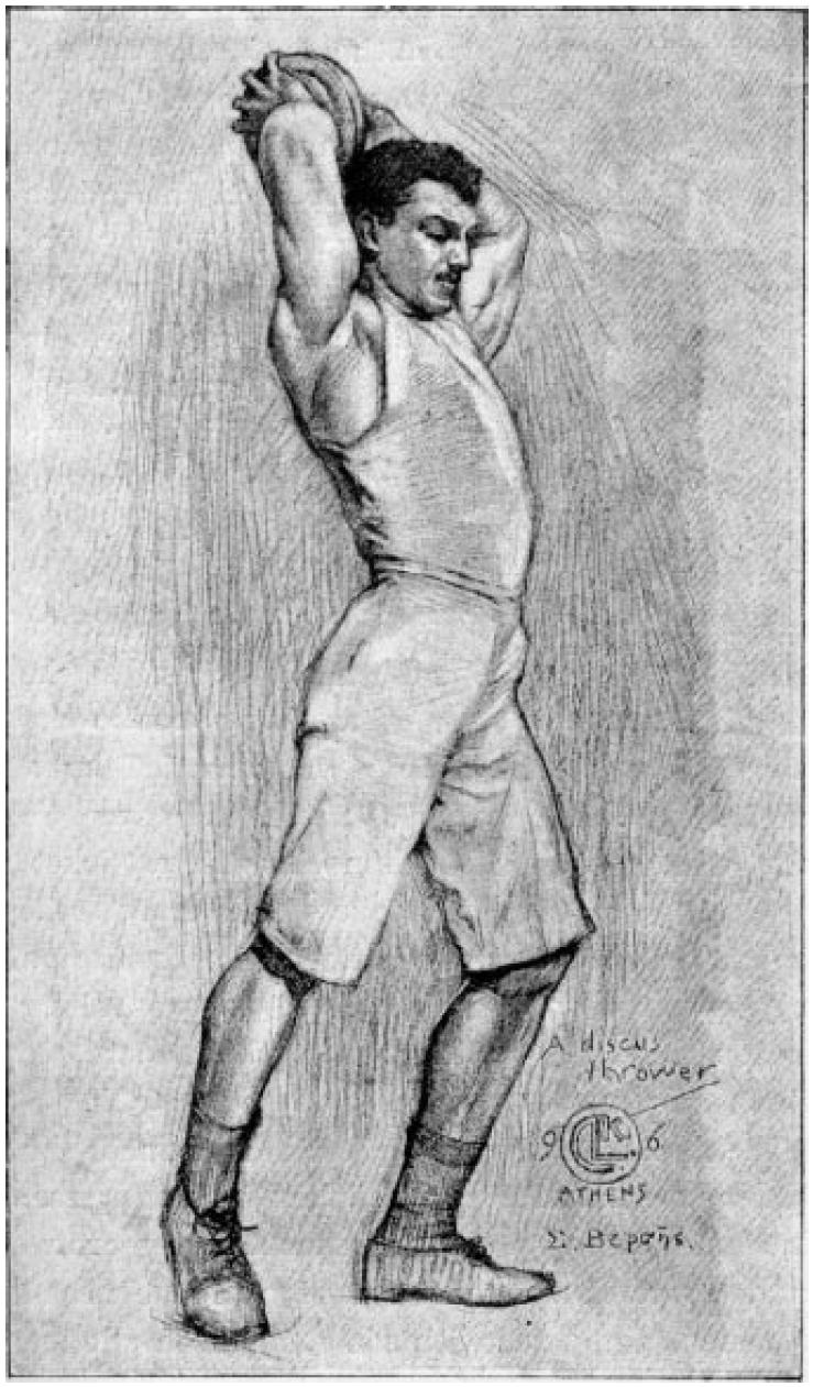 Olympiasieger 1896